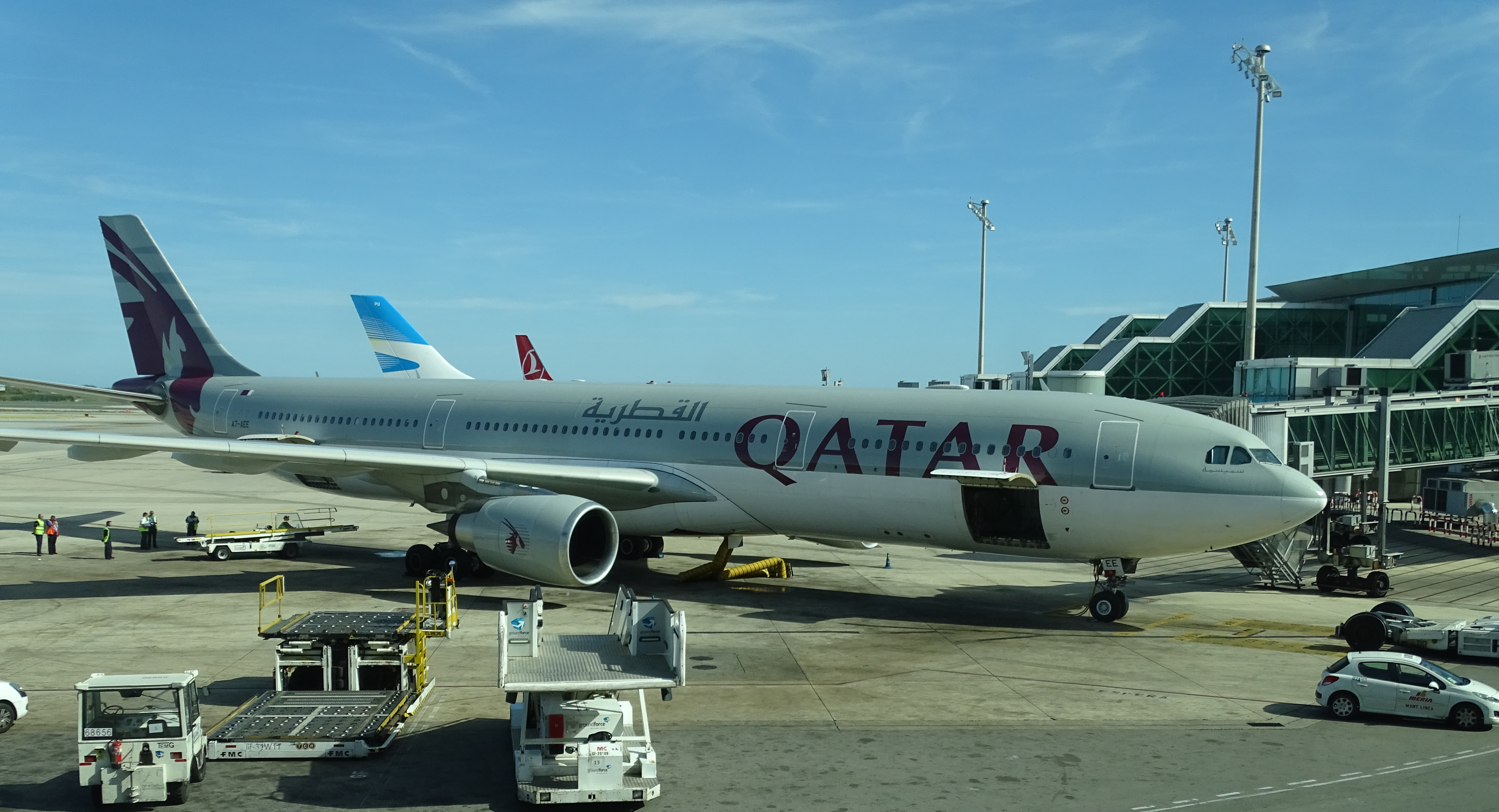 Qatar Airways Airbus A330-302 A7-AEE (cn 711) op de luchthaven Barcelona-El Prat